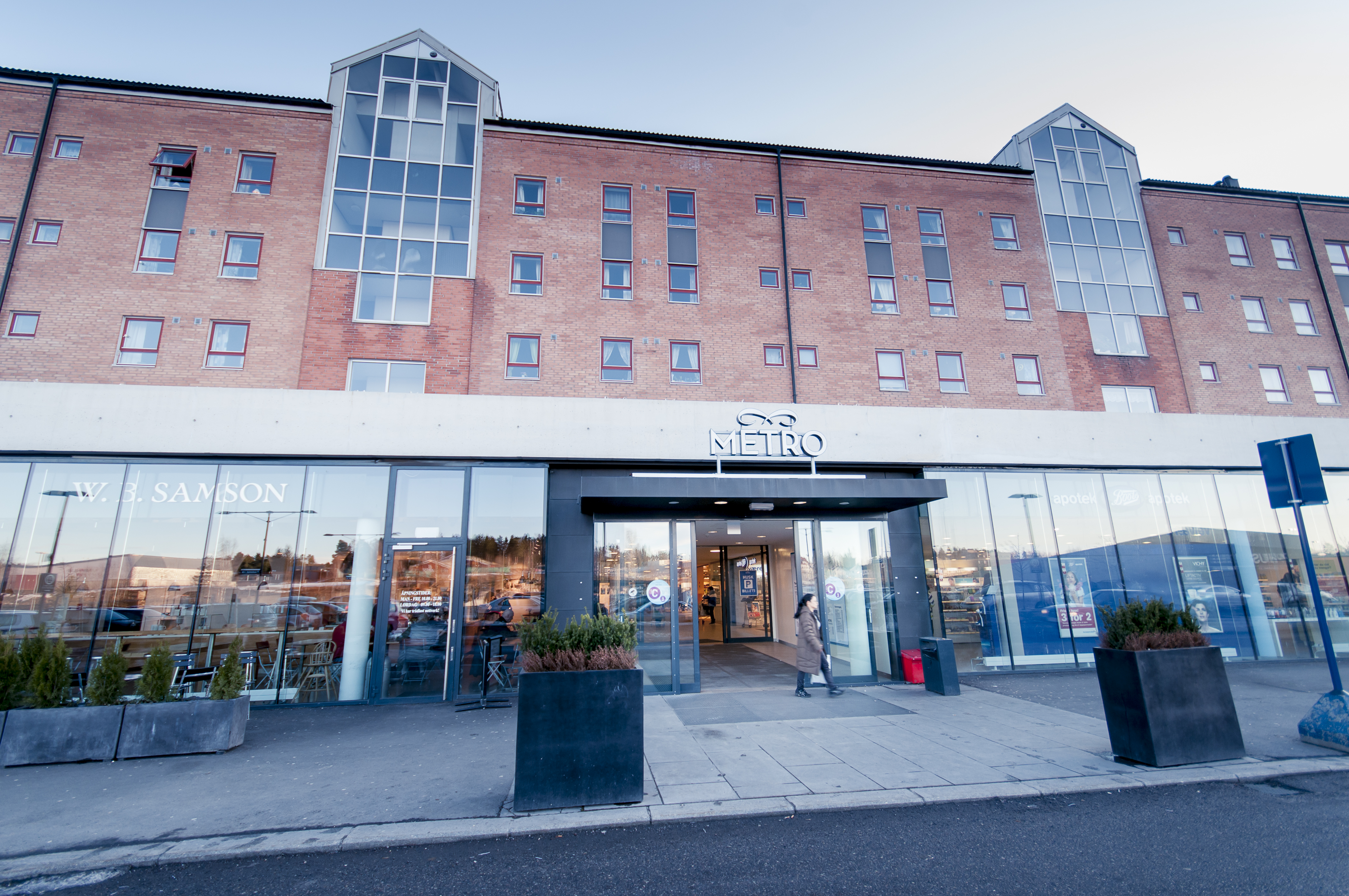 Metro Senter hovedinngang